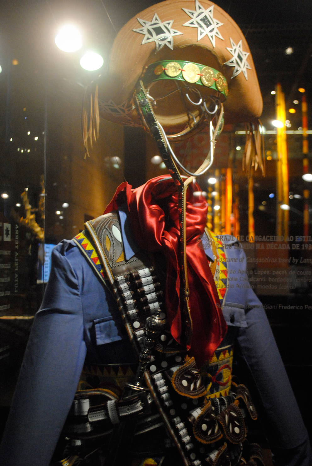 Vestimenta de cangaceiro no Museu Cais do Sertão - Recife, Pernambuco, Brasil